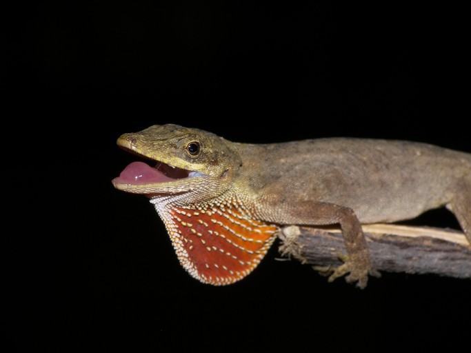 Norops mariarum